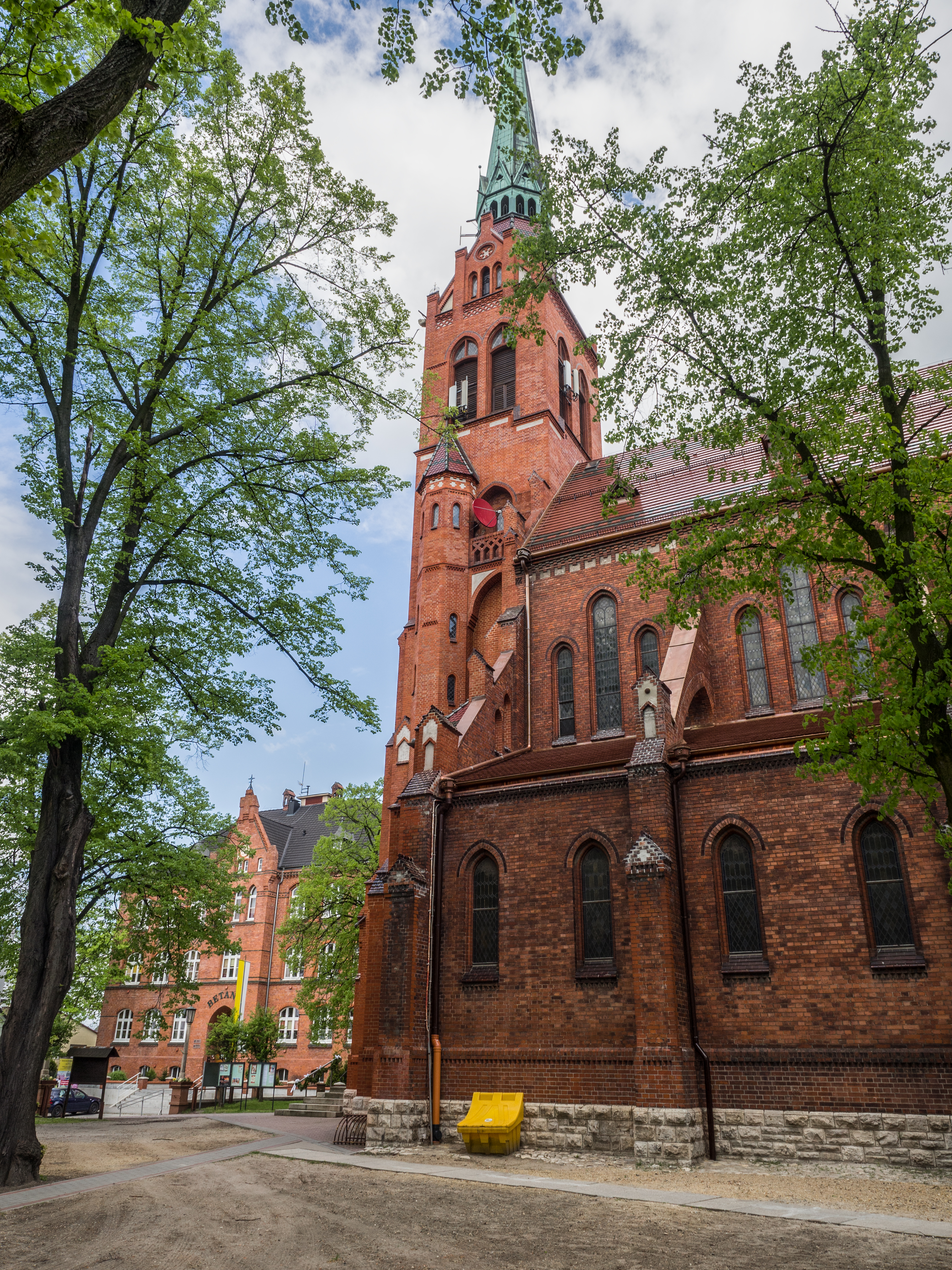 Opole, kościół par. pw.w. Matki Boskiej Nieustajacej Pomocy, 1902-1904